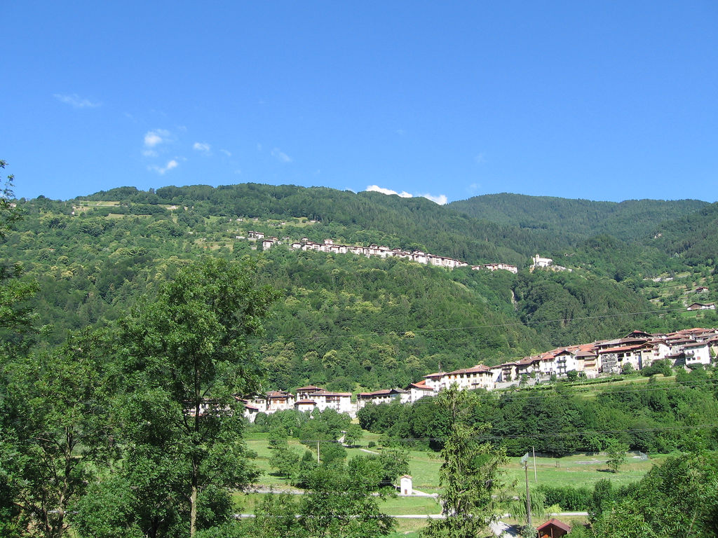 Cimego, visibile sullo sfondo Castel Condino, Trentino Alto Adige, Italia